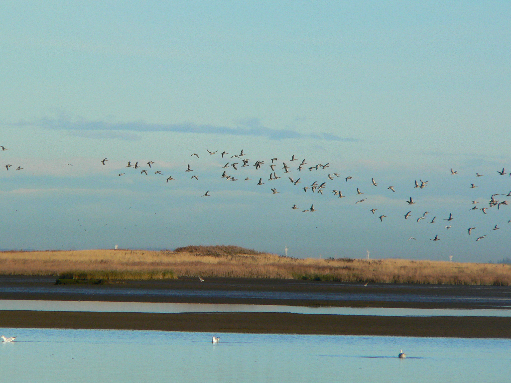 Fugleliv i Nationalpark Vadehavet